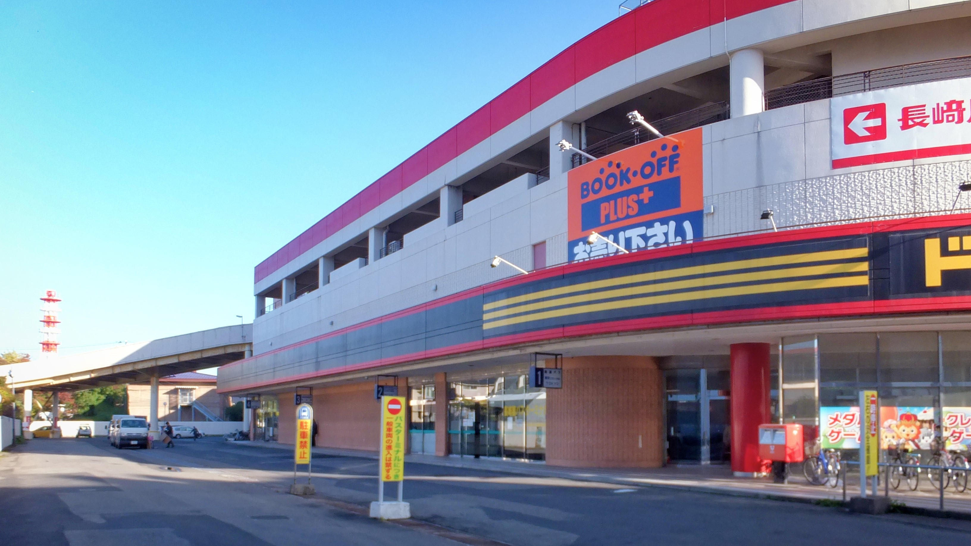 秋田中央交通長崎屋バスターミナル